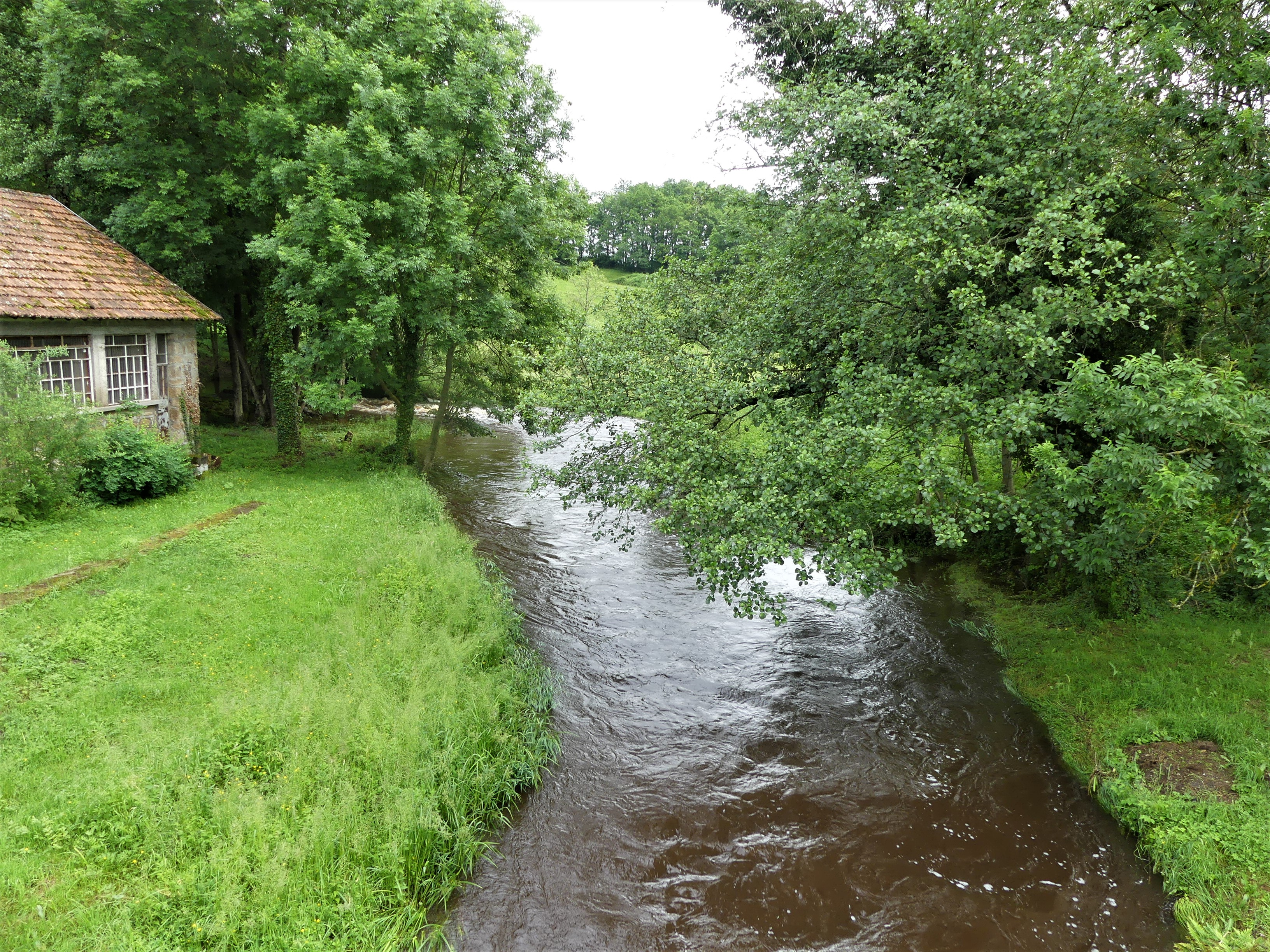 La Gosne en amont du pont situé au nord de la route départementale 941, Saint-Hilaire-le-Château, Creuse, France.